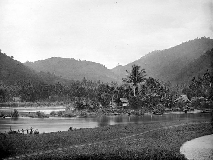 Negatief. Kampong Talumolo